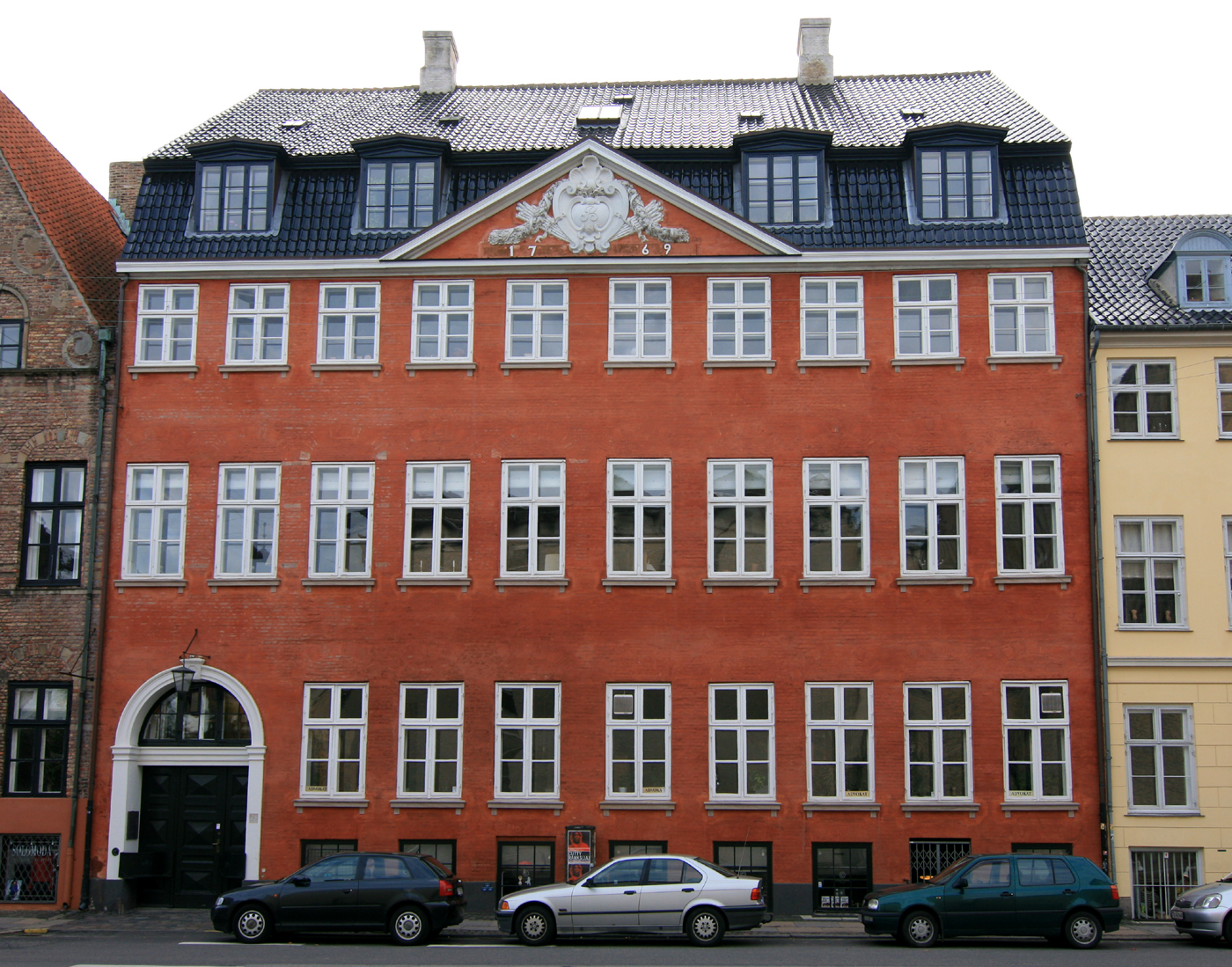 Behagens Gård, Strandgade 26, København. Bygget 1769. Fredet.